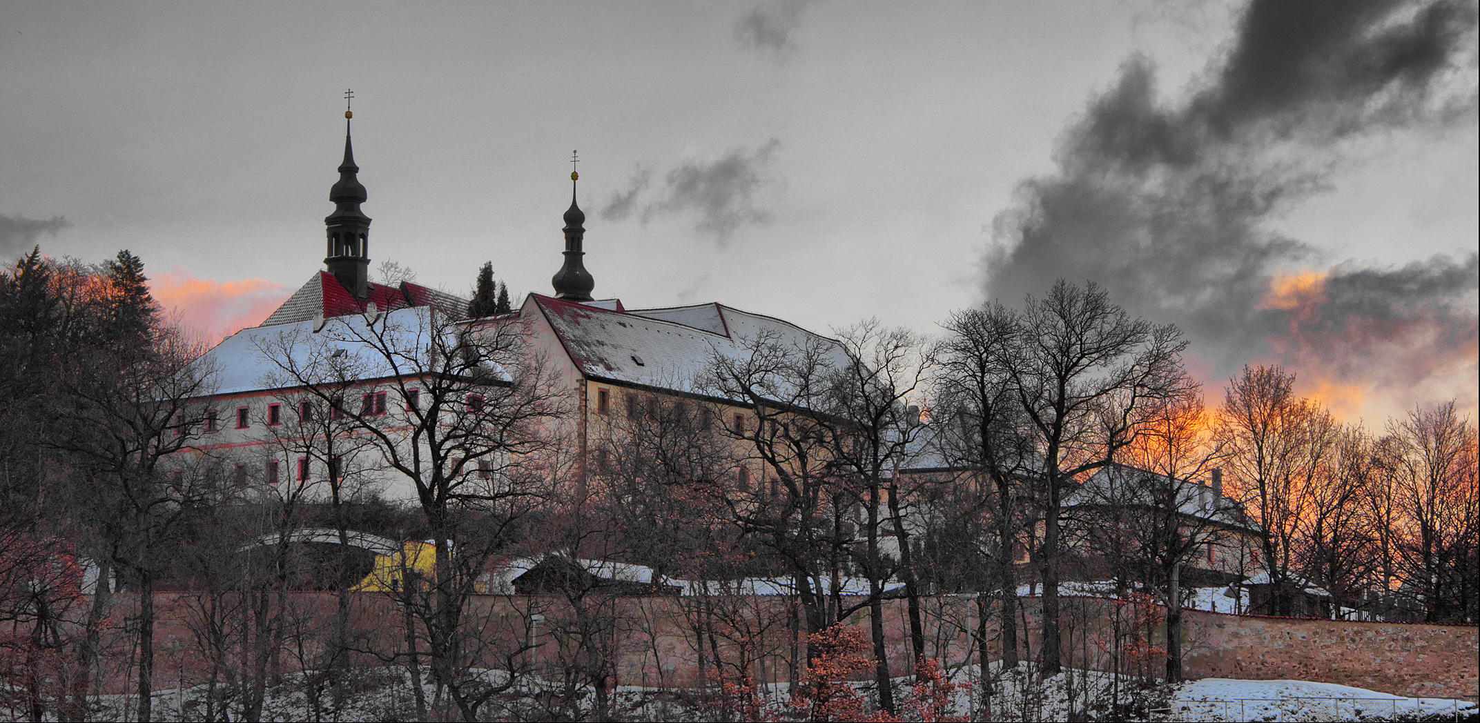 Klášter františkánský (s kostelem 14 sv. Pomocníků) (Kadaň), Jana Švermy 474, Kadaň